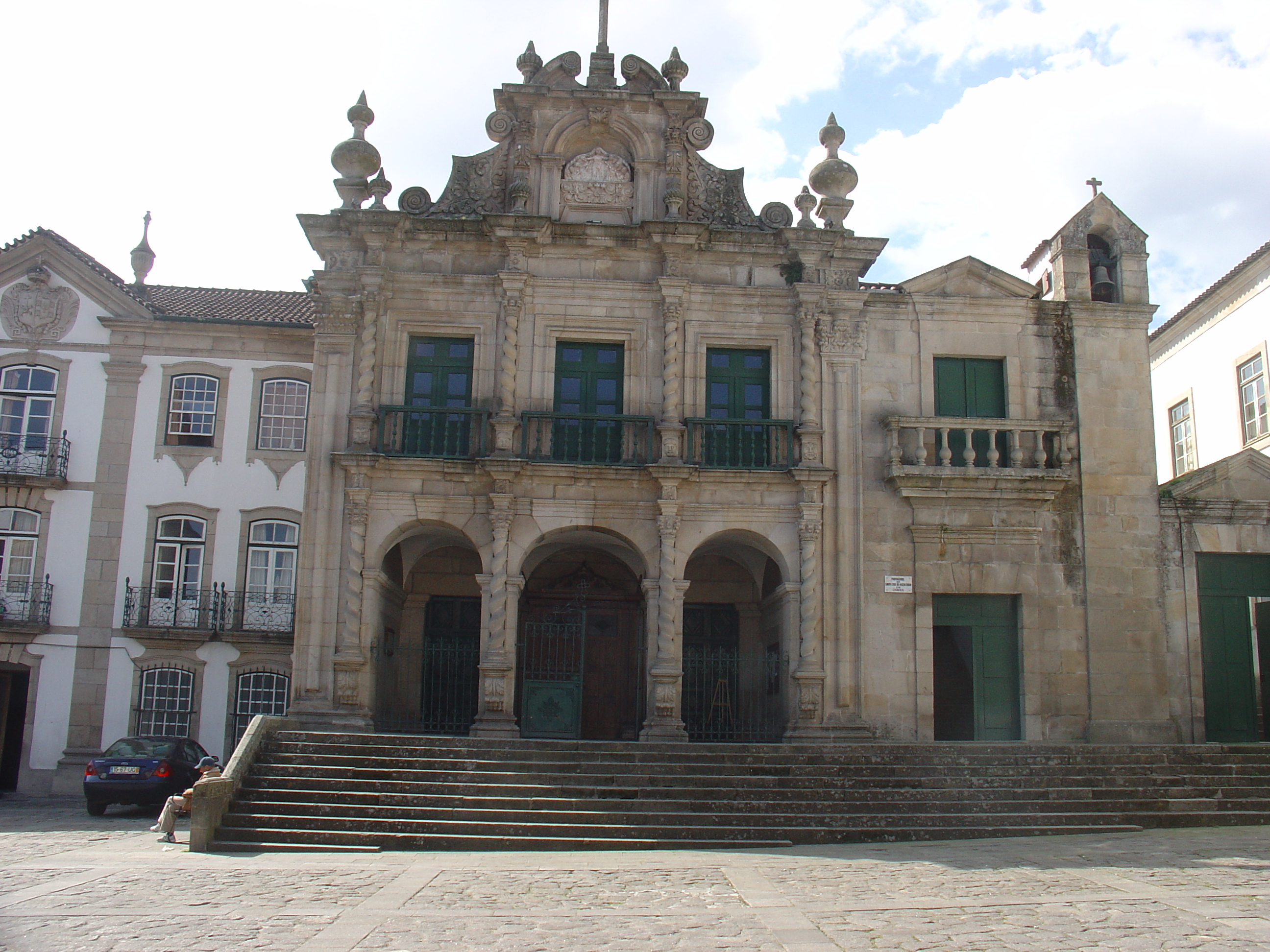 Chaves-Igreja da Misericórdia